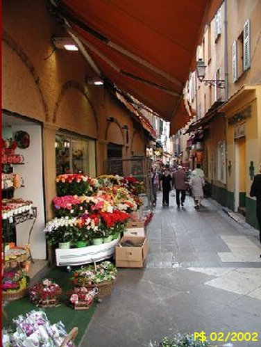 La rue Pairolière à son début en direction de la place Saint-François, un dimanche (les commerces sont fermés).